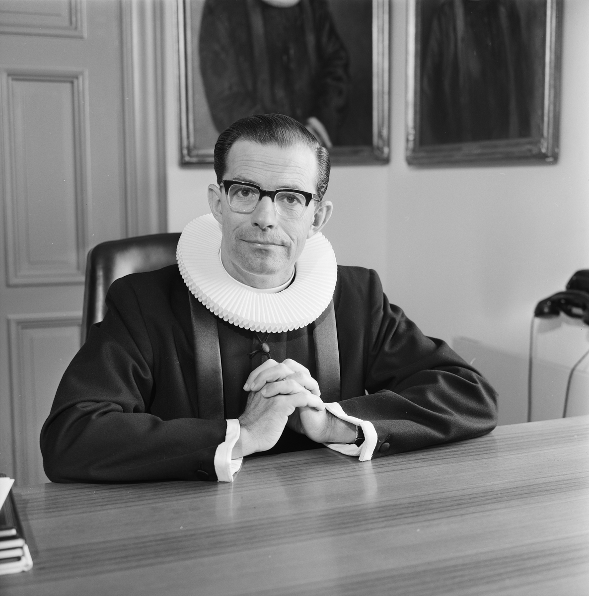 Sigurd Lunde (1916–2006), biskop i Stavanger bispedømme fra 1976 til 1986